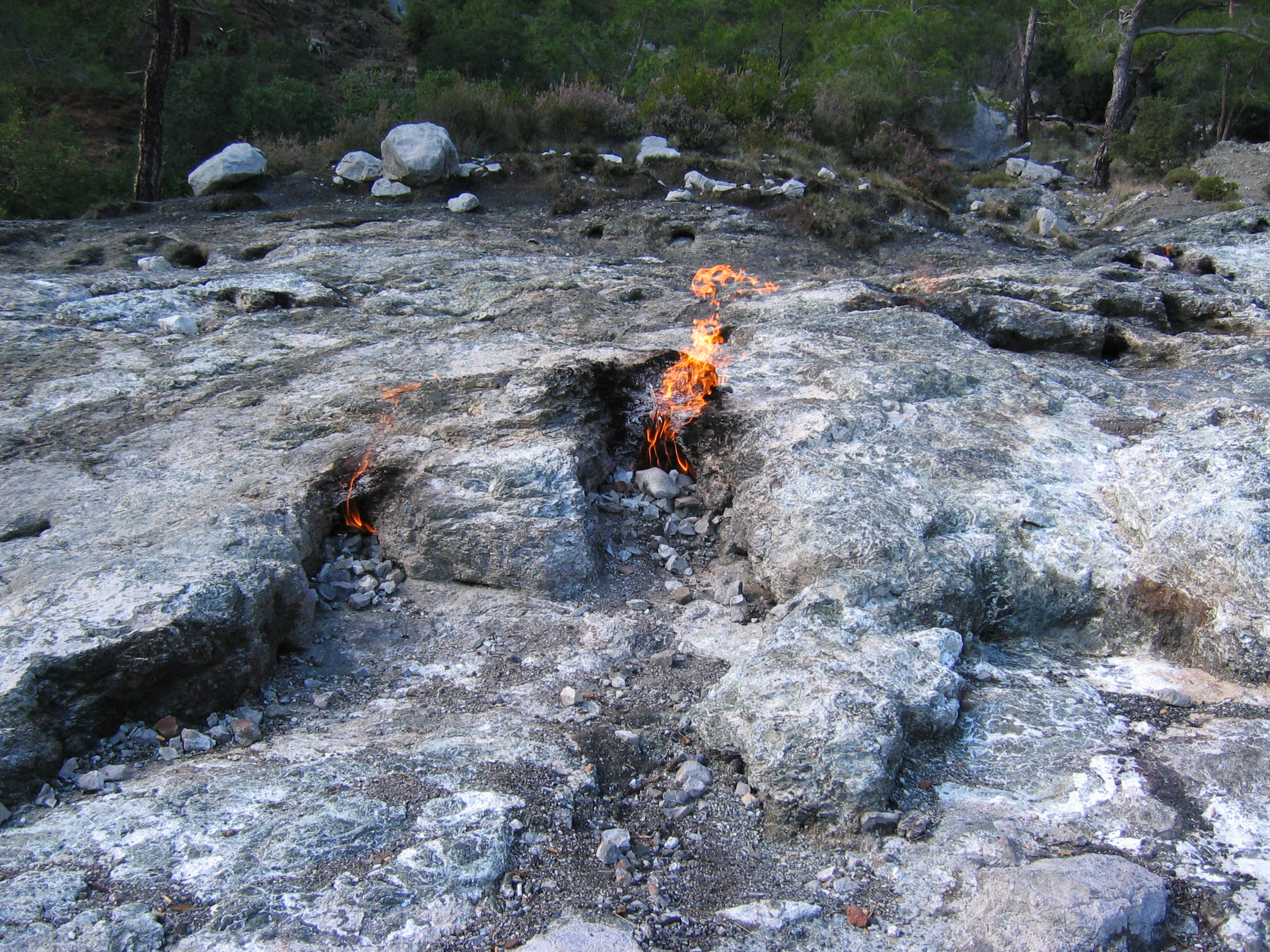 Erdgasfeuer in Chimaira